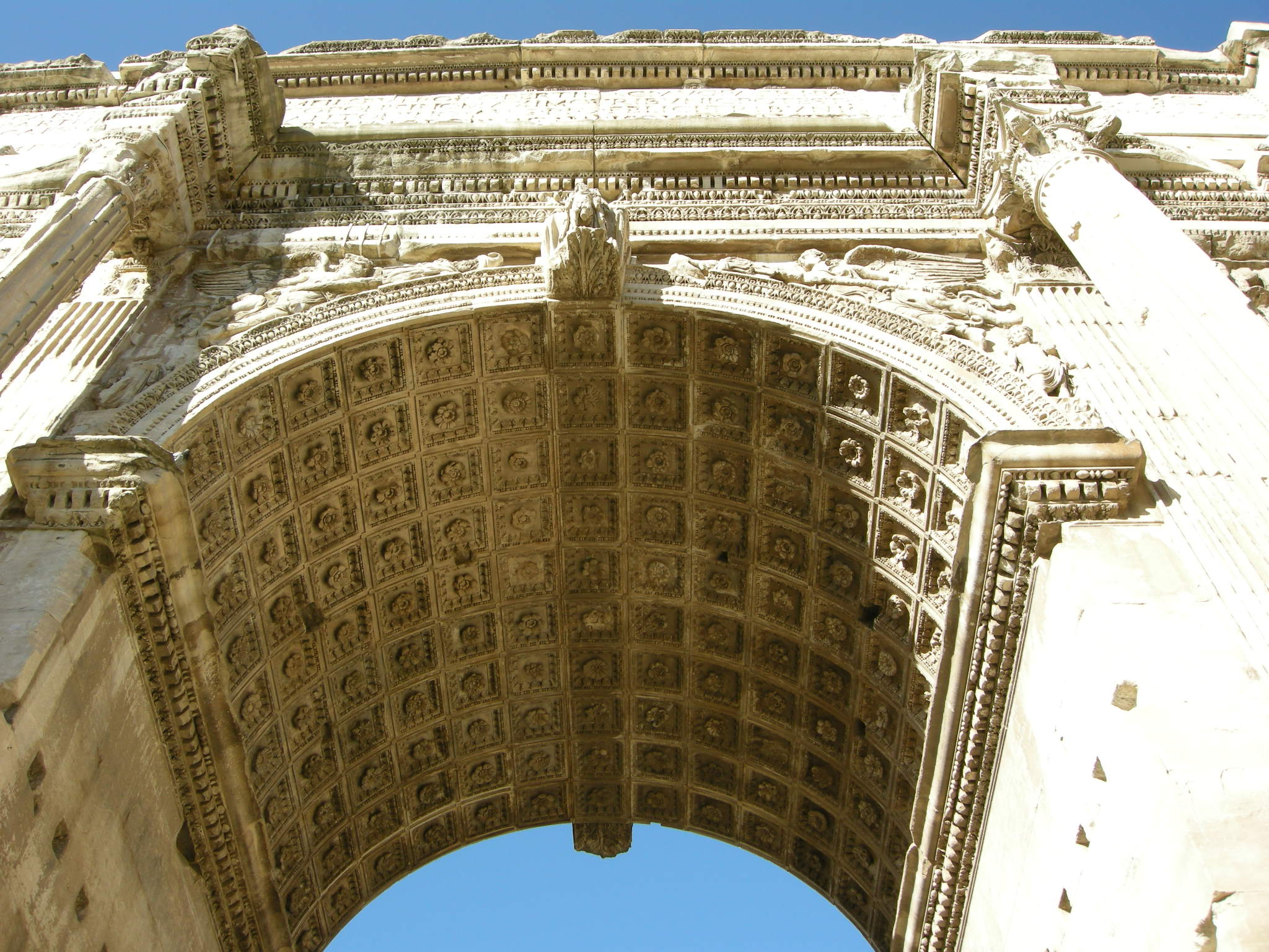 Arco di settimio severo, rilievi arco